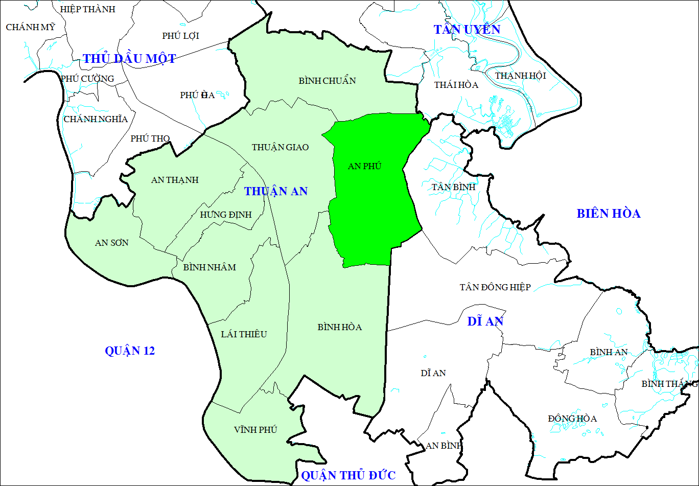 Phường An Phú